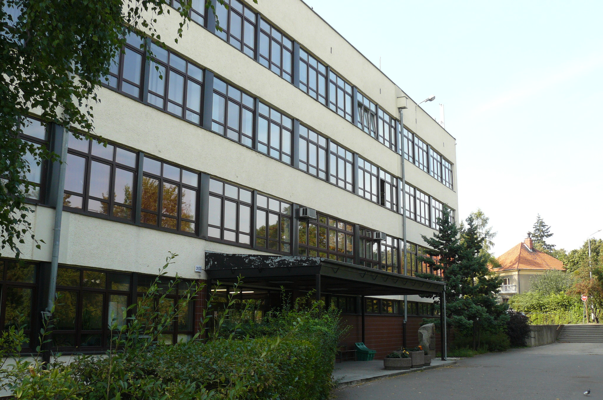 Gmach Collegium Chrząszcza na ul. Wojska Polskiego w Poznaniu.